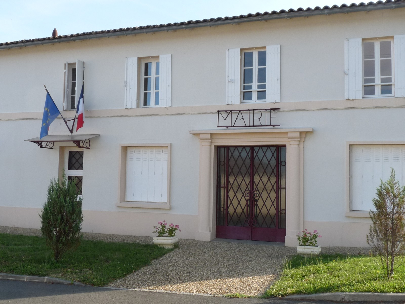 Mairie de St-Christophe-de-Double, Gironde, France